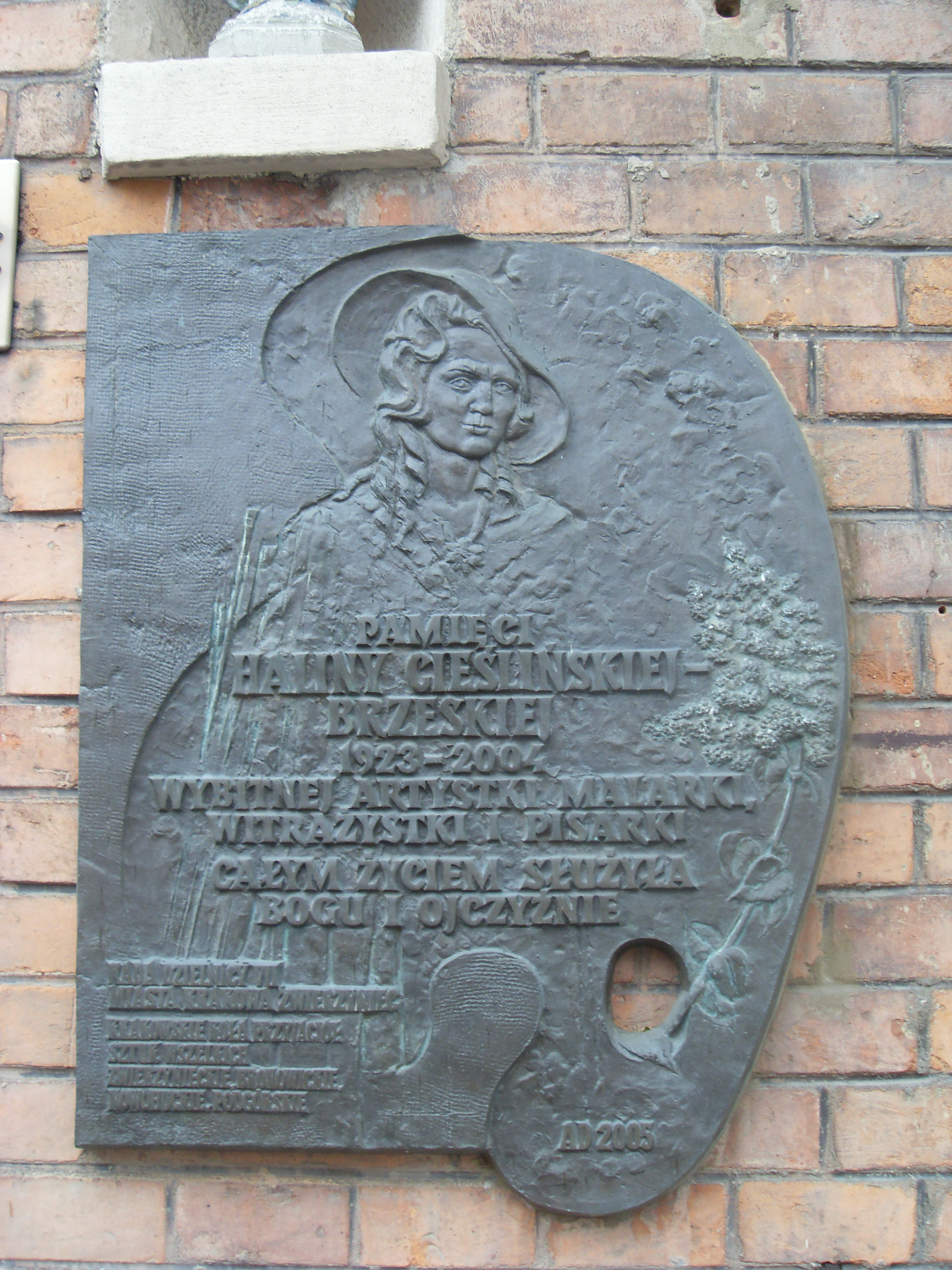 Tablica pamiątkowa ku czci Haliny Cieślińskiej Brzeskiej na zwierzynieckim oddziale Muzeum Historycznego Miasta Krakowa (dawny Dom Lenina)